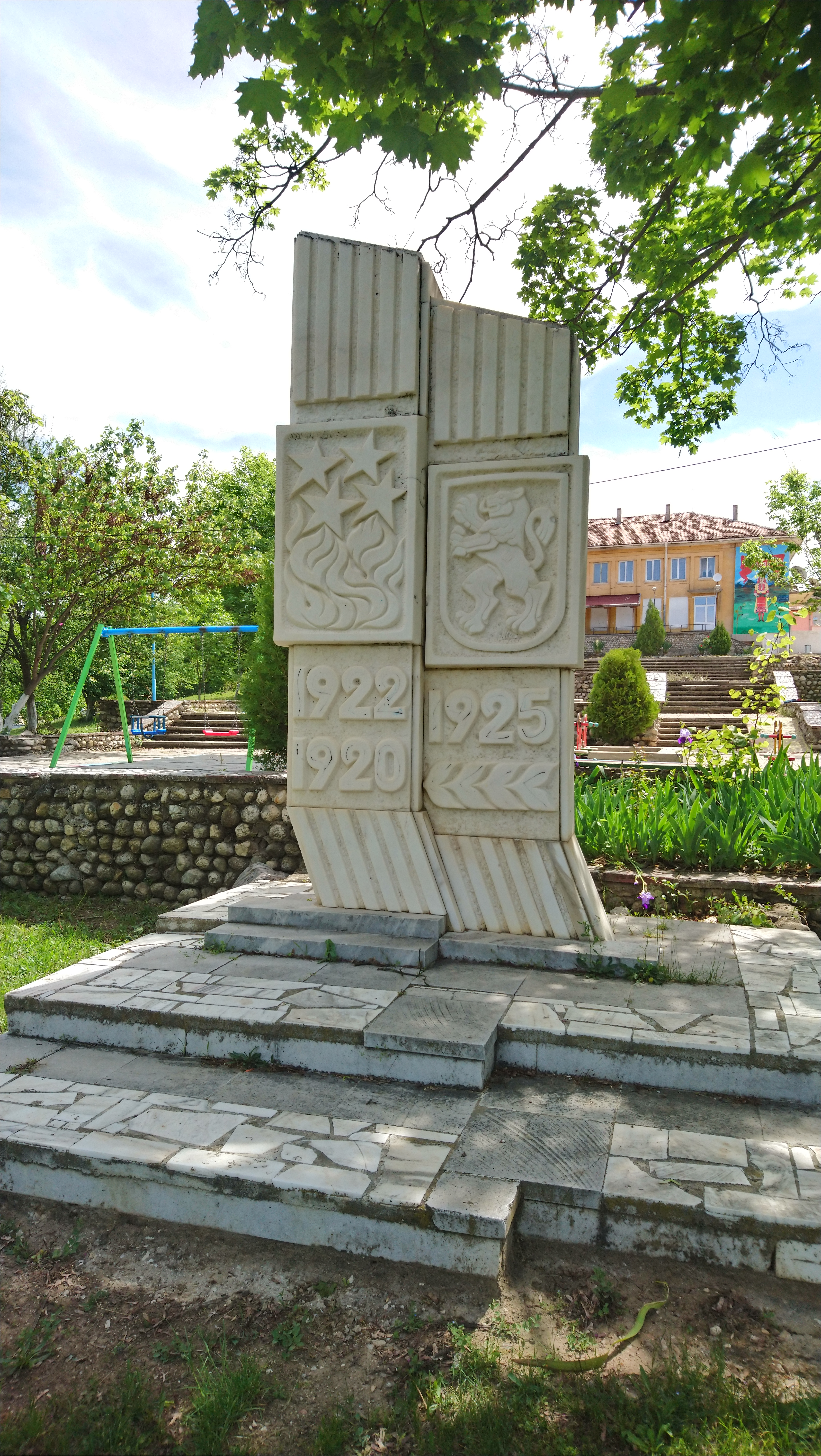 Военният паметник в центъра на село Марикостиново